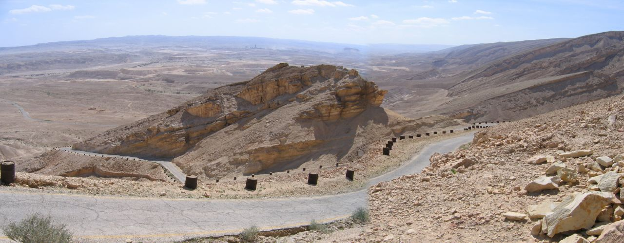 Maale Aqrabim, Negev desert